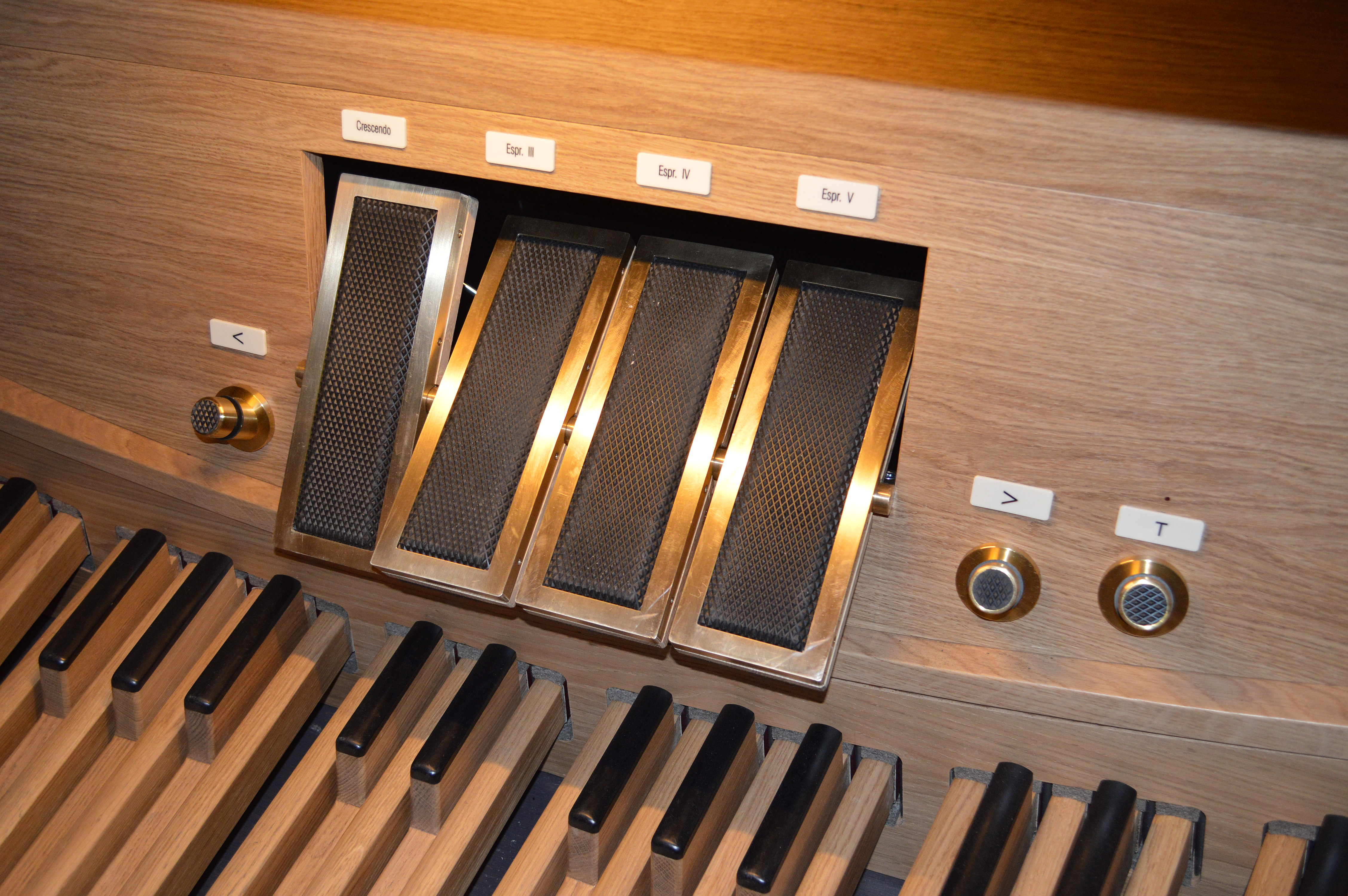 Staffe e pedaletti della consolle maggiore.